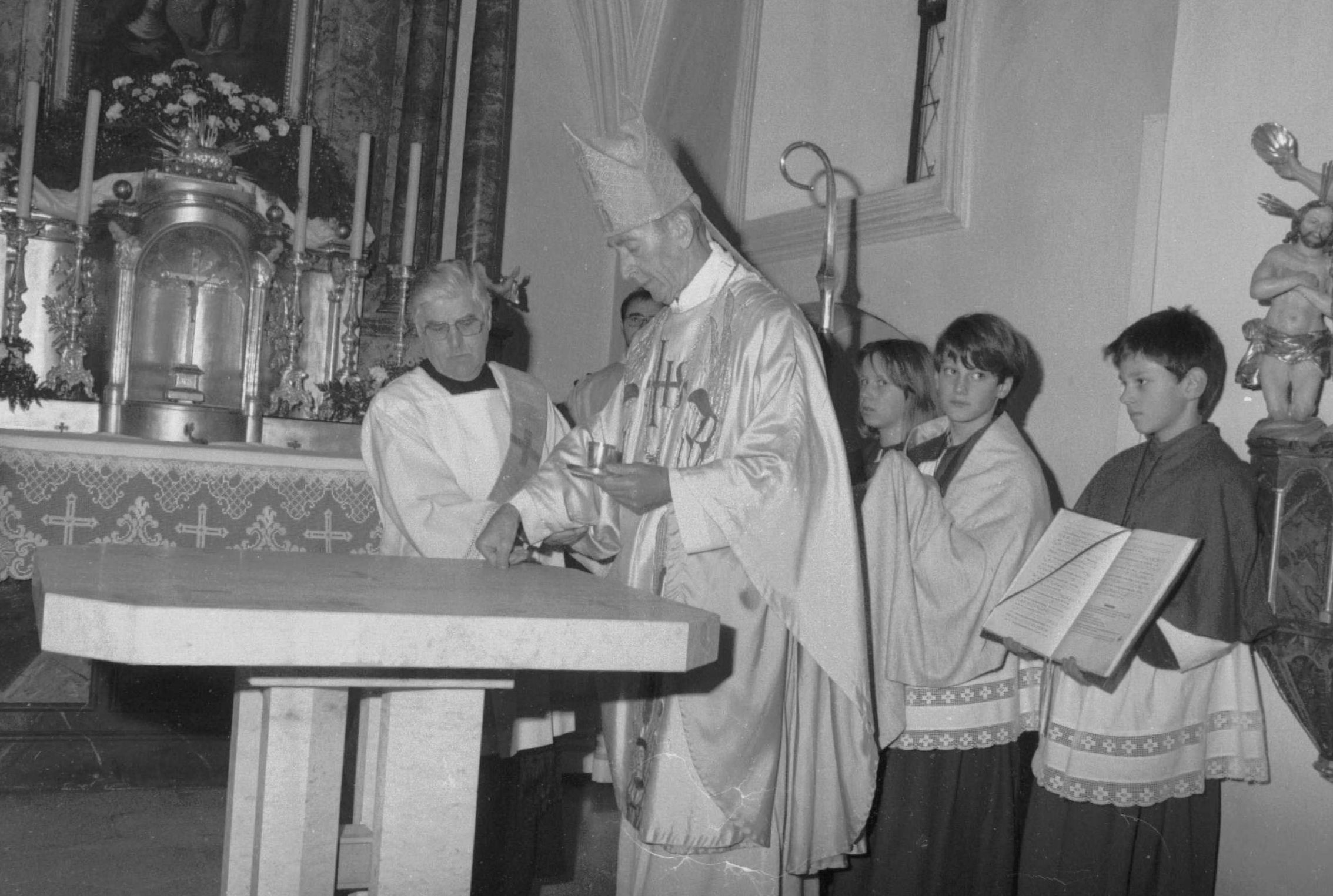 Weihe des Volksaltars in Dinkelshausen mit Weihbischof Rudolf Schmid.